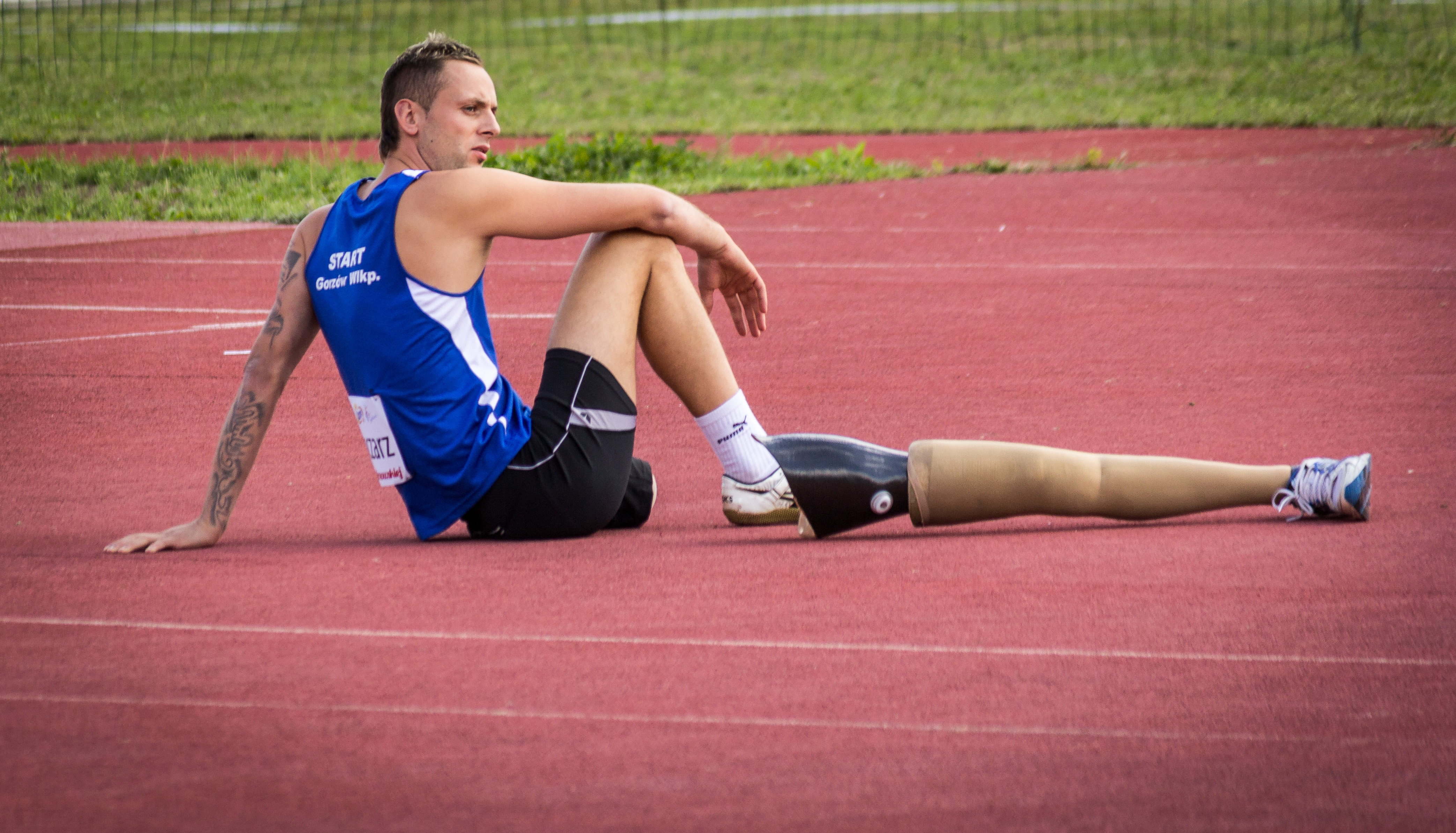 Memoriał Kamili Skolimowskiej w Warszawie, 2013-08-25